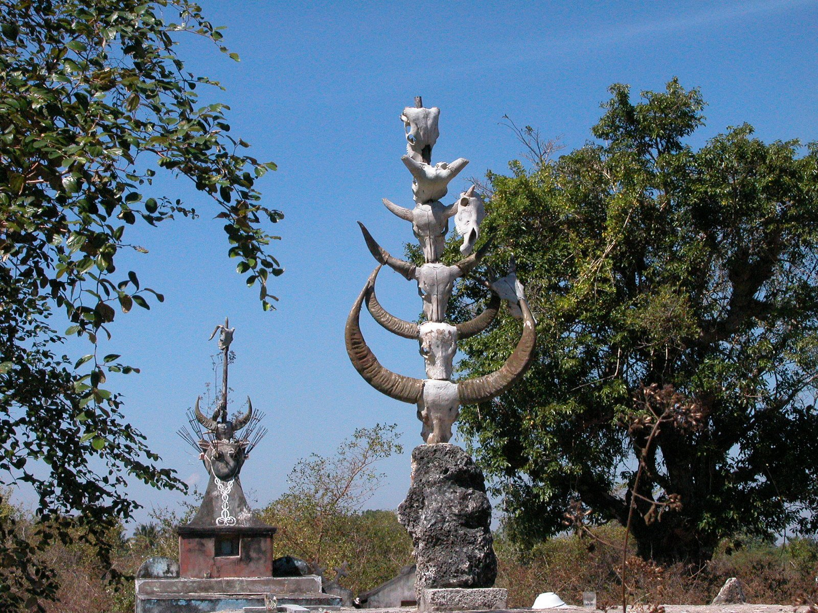 Mahnmal an der Straße zwischen Com und Lospalos